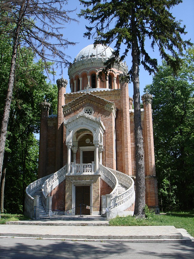 Capela din parcul Palatului Știrbei din Buftea 02